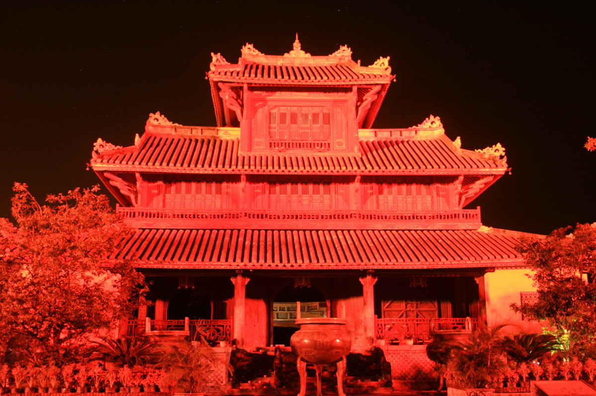 Hiển Lâm Các về đêm